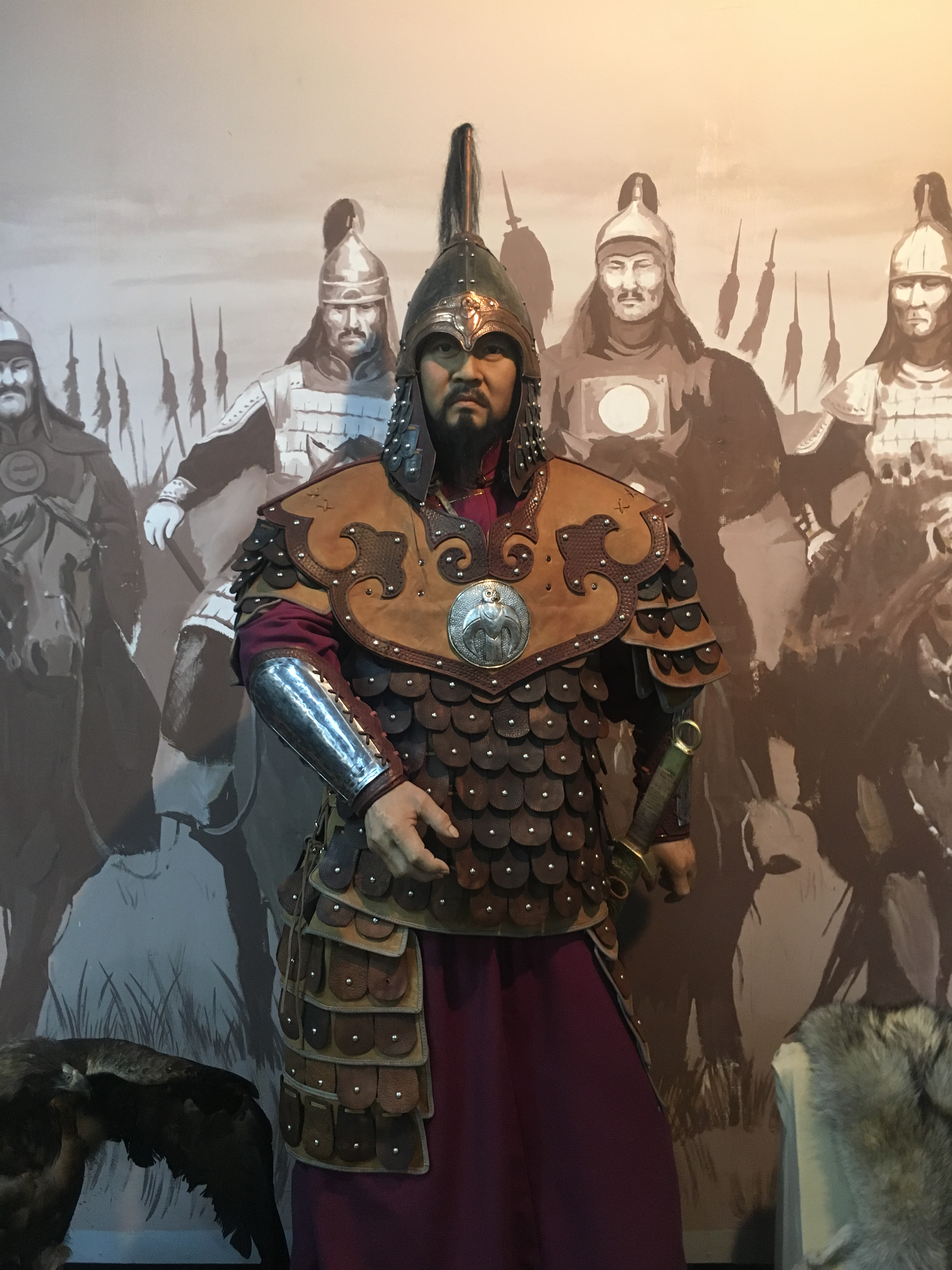 Фигура Субедея. Национальный Музей Республики Тыва